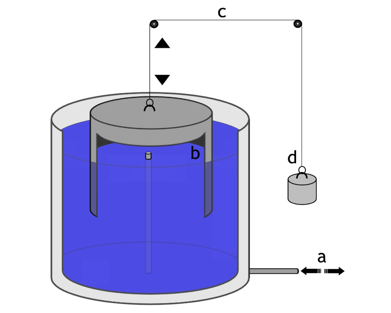 Prinzipielle Funktionsweise eines Nassspirometers (Gerät zur Messung und Darstellung der Atemgröße und Lungenvolumina) / Function principle of an aeroplethysmograph.